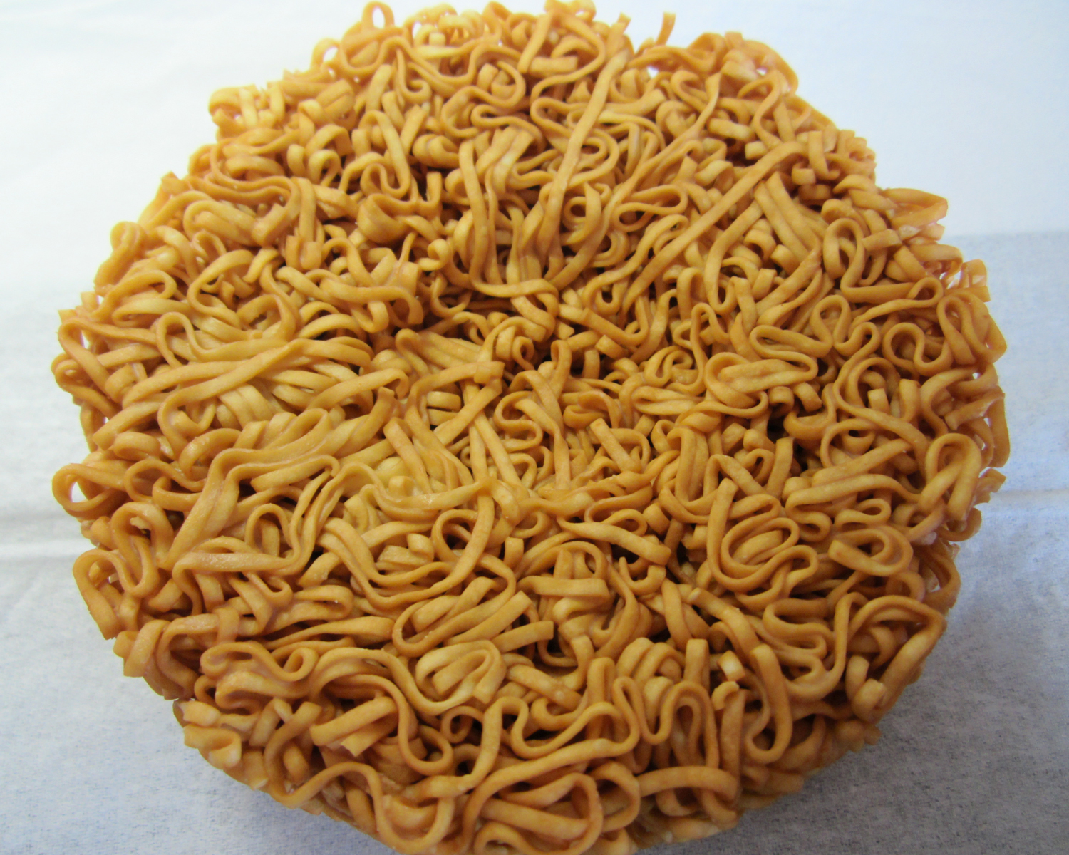 チキンラーメン卵ポケット